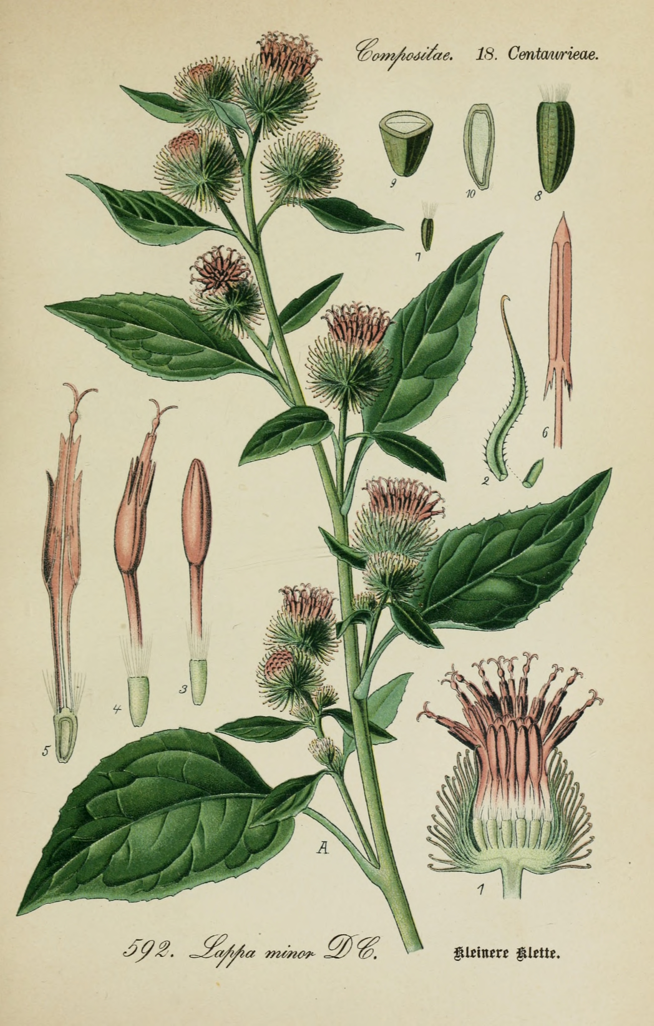 Thomé, O. W. (1905) Prof. Dr. Thomé's Flora von Deutschland, Österreich und der Schweiz. 4. Band. Gera. Tafel 592. (als Lappa minor) Legende: A Oberer Teil der Pflanze. 1 Körbchen, Längsschnitt. 2 Hüllblatt, Stachel (stark vergr.). 3 Röhrenblüte, Knospe. 4 Röhrenblüte. 5 Röhrenblüte, Längsschnitt. 6 Staubblatt. 7 Frucht (x1). 8 Frucht. 9 Frucht, Querschnitt. 10 Frucht, Längsschnitt. (1-6, 8-10 vergr.).